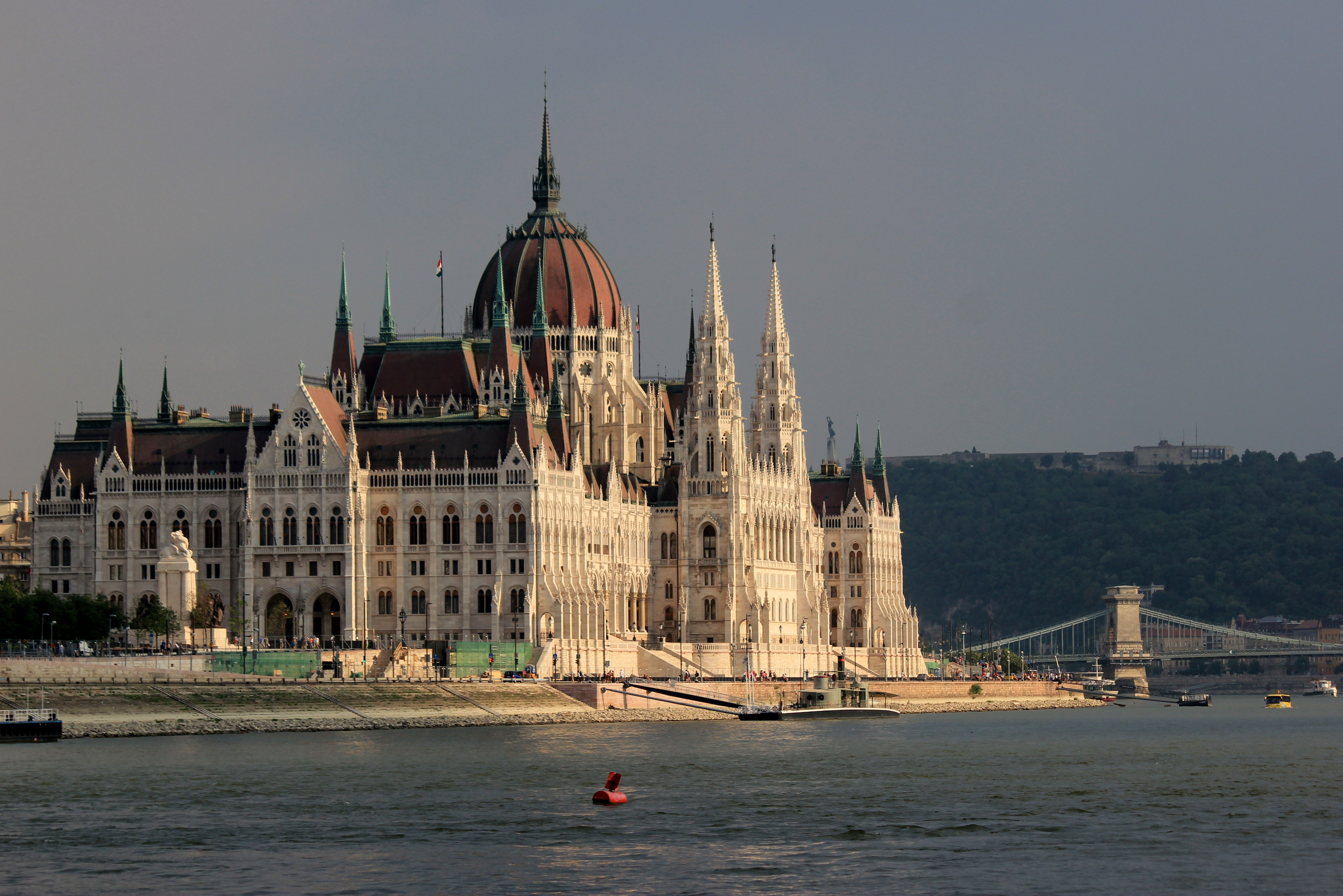 Das ungarische Parlamentsgebäude in Budapest.